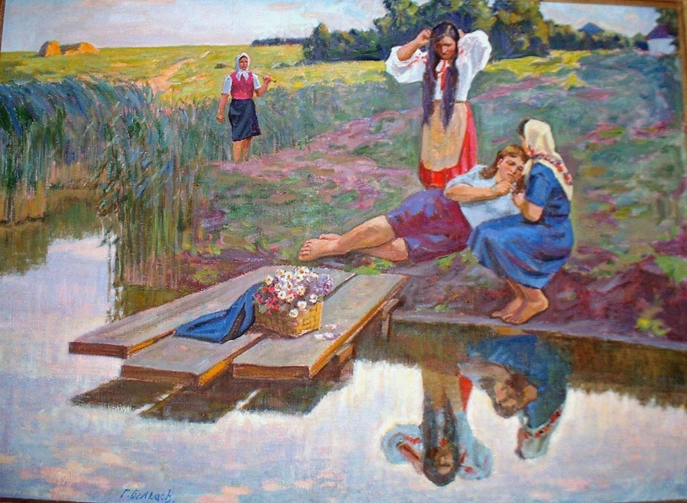 Бельцов Г.І. «Український вечір»